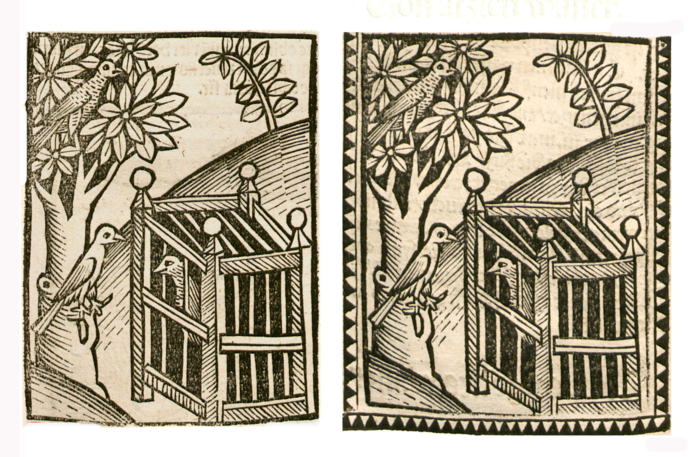 Abbildung von: Spatzen